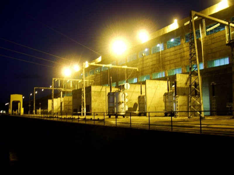 São 6 tranformadores elevadores de 13800v para 230.000v.